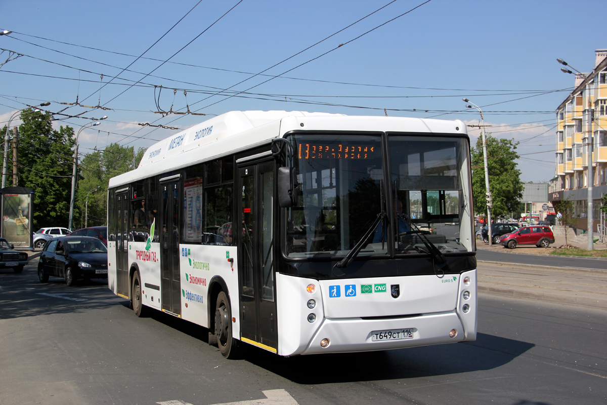 Рестайлинговый Нефаз-5299-30-51